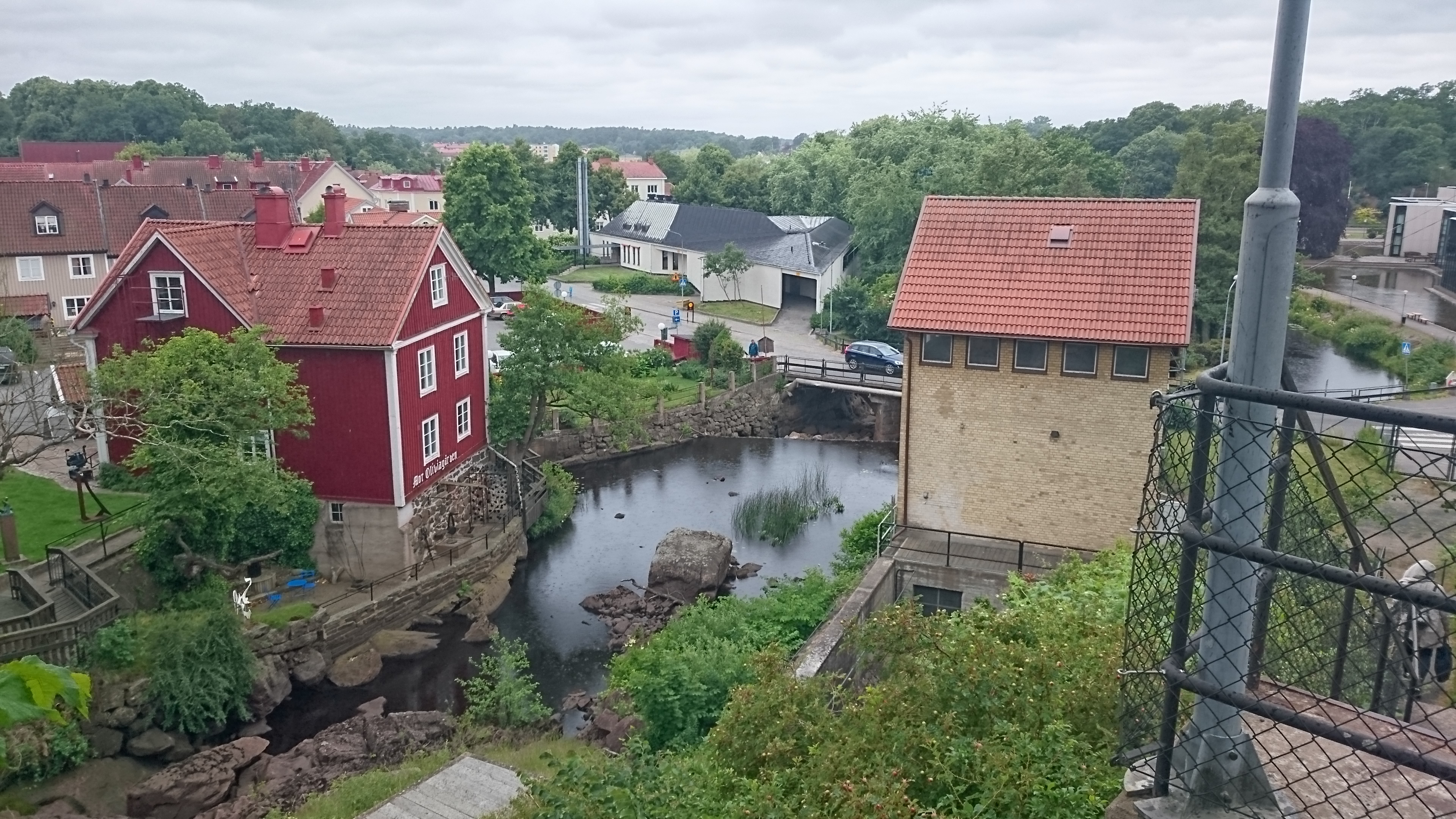 Kvarteret Axel ses i bildens mitt med den vita före detta läkarstationen. I förgrunden Ronnebyån, till höger skymtar Stadshuset i Ronneby och till väster [Mor Oliviagården .